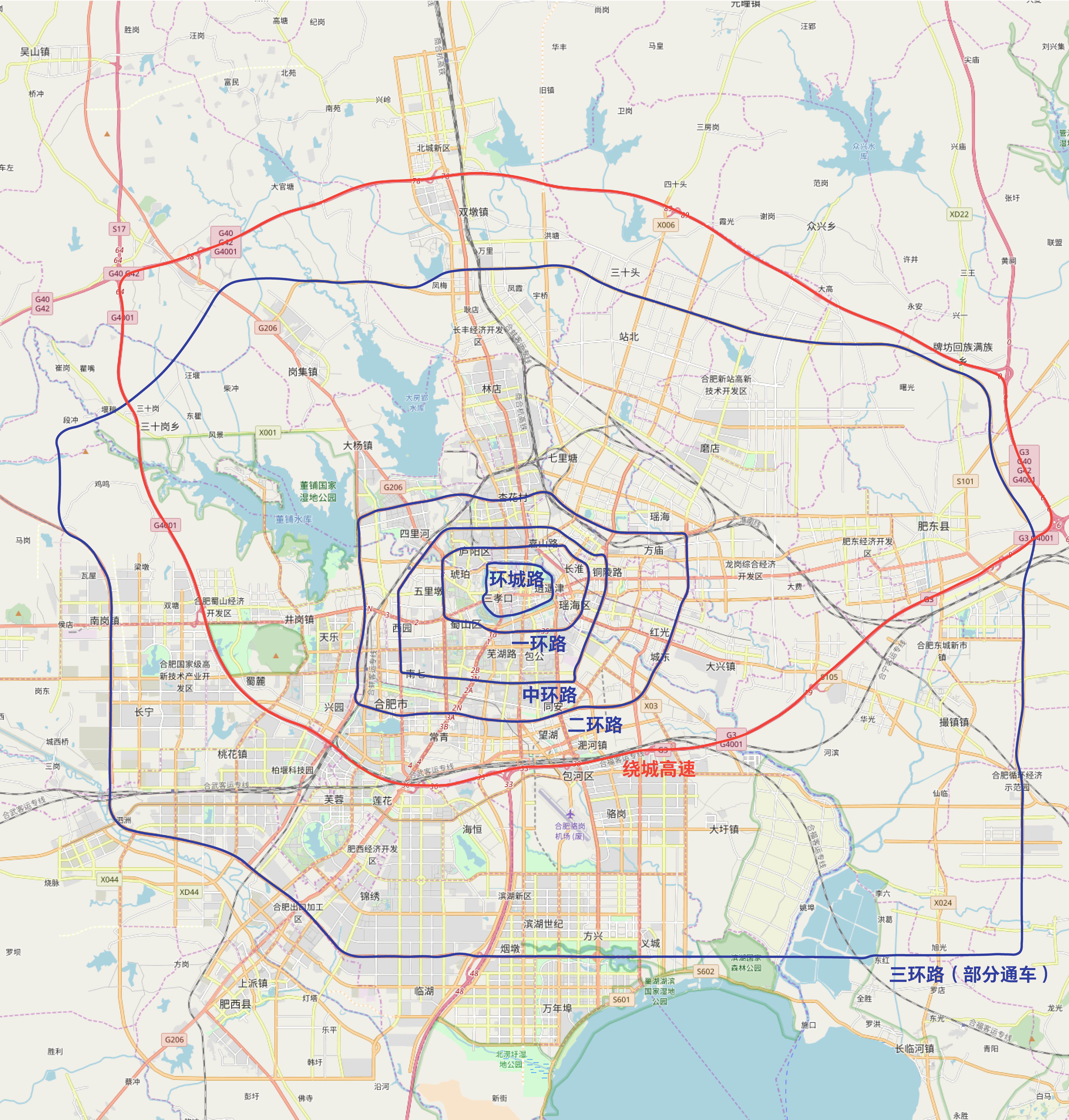 中文（中国大陆）: 标红为G4001合肥绕城高速；蓝色环路从里到外分别为环城路、一环路、中环路、二环路、三环路